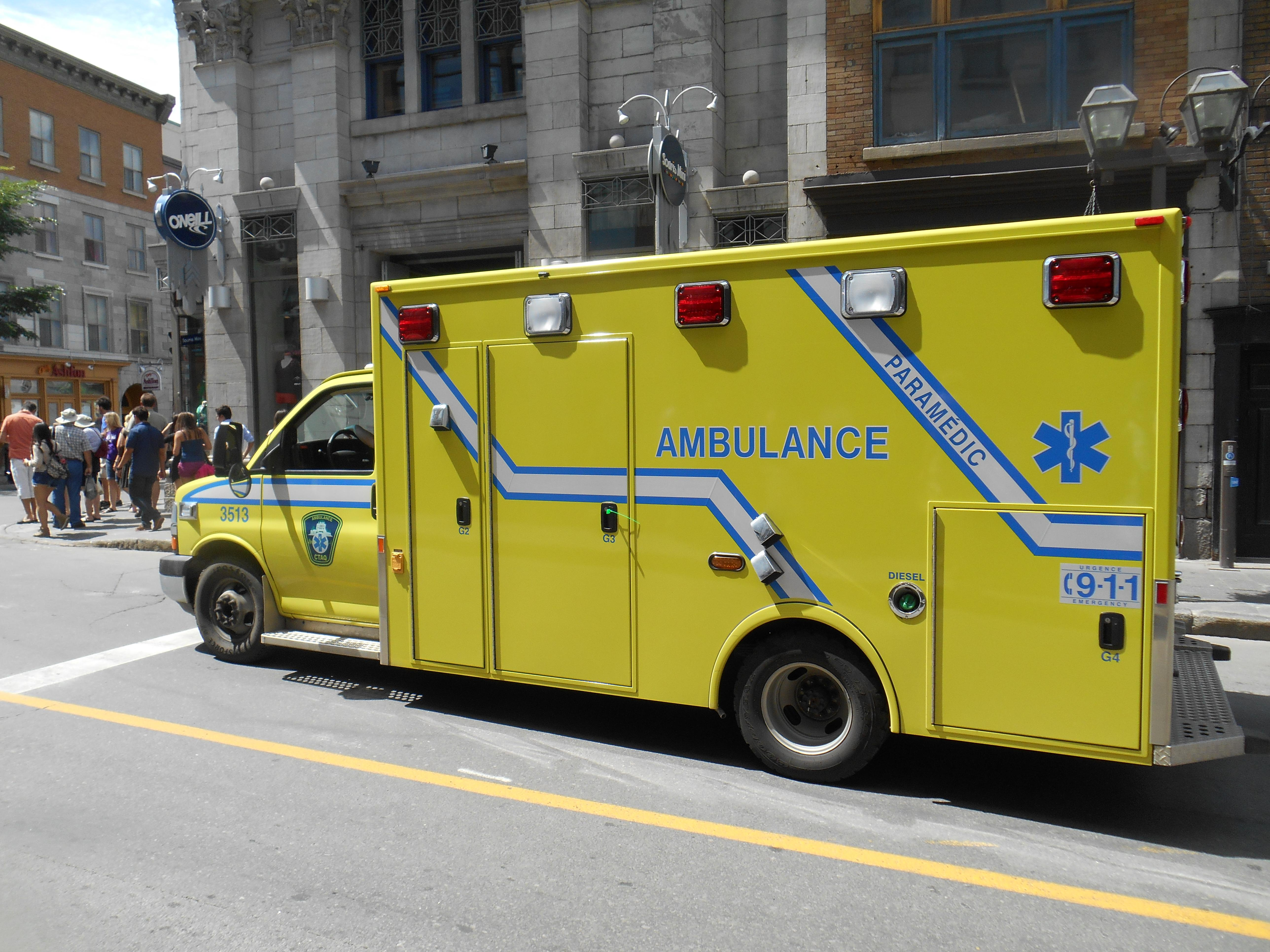 Rue Saint-Jean, Québec